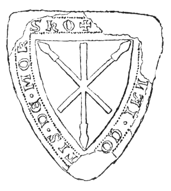 ilustracja